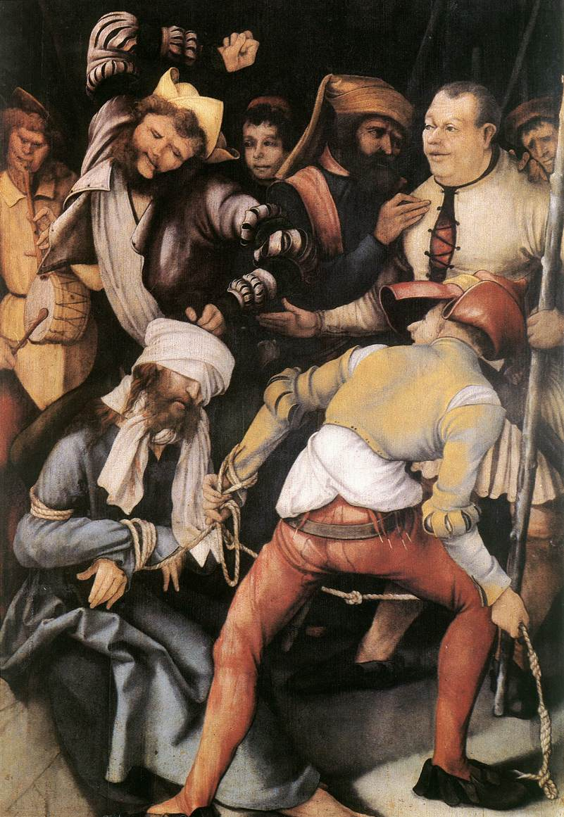 detail